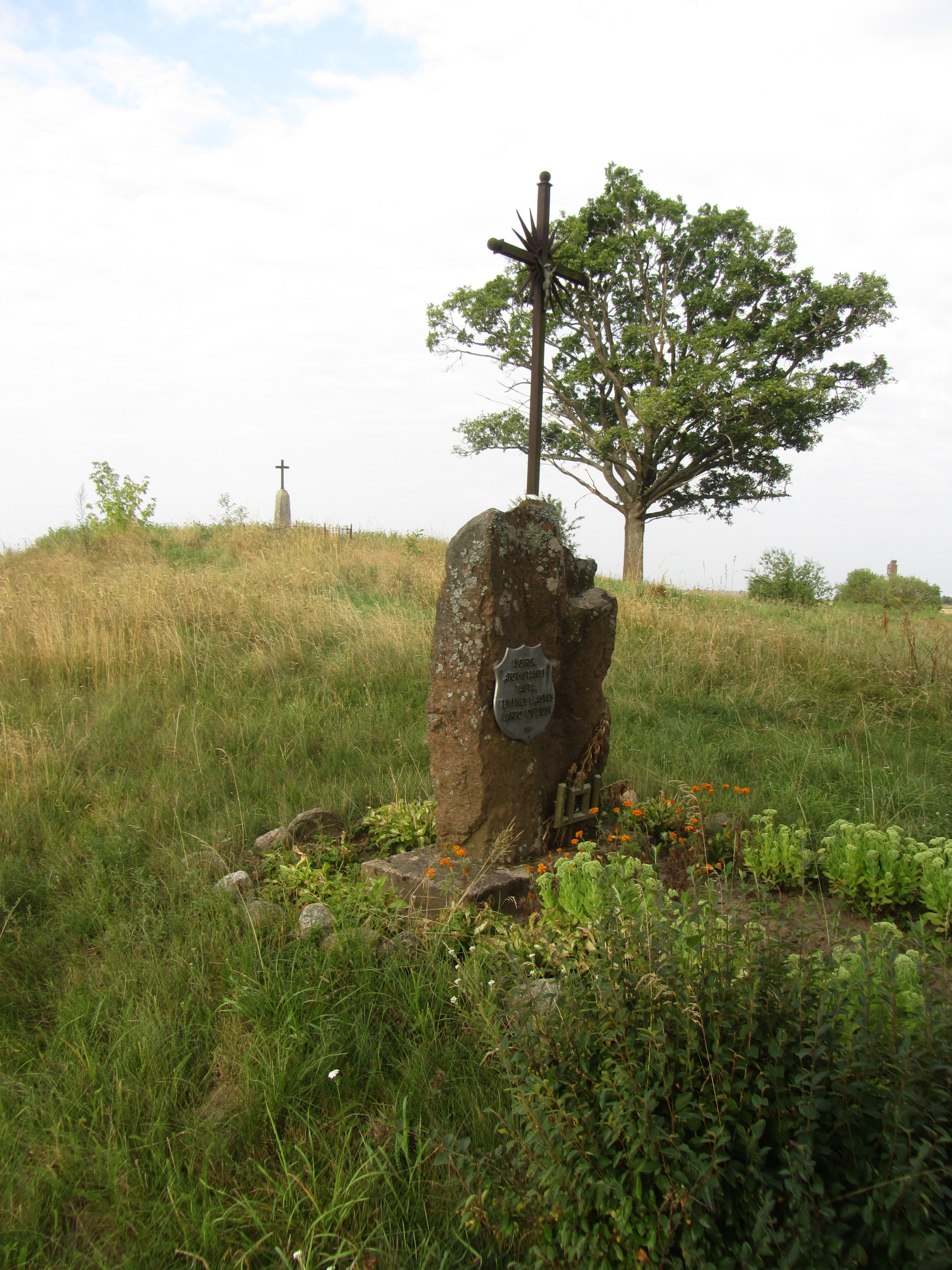 Kibyšiai, Lithuania